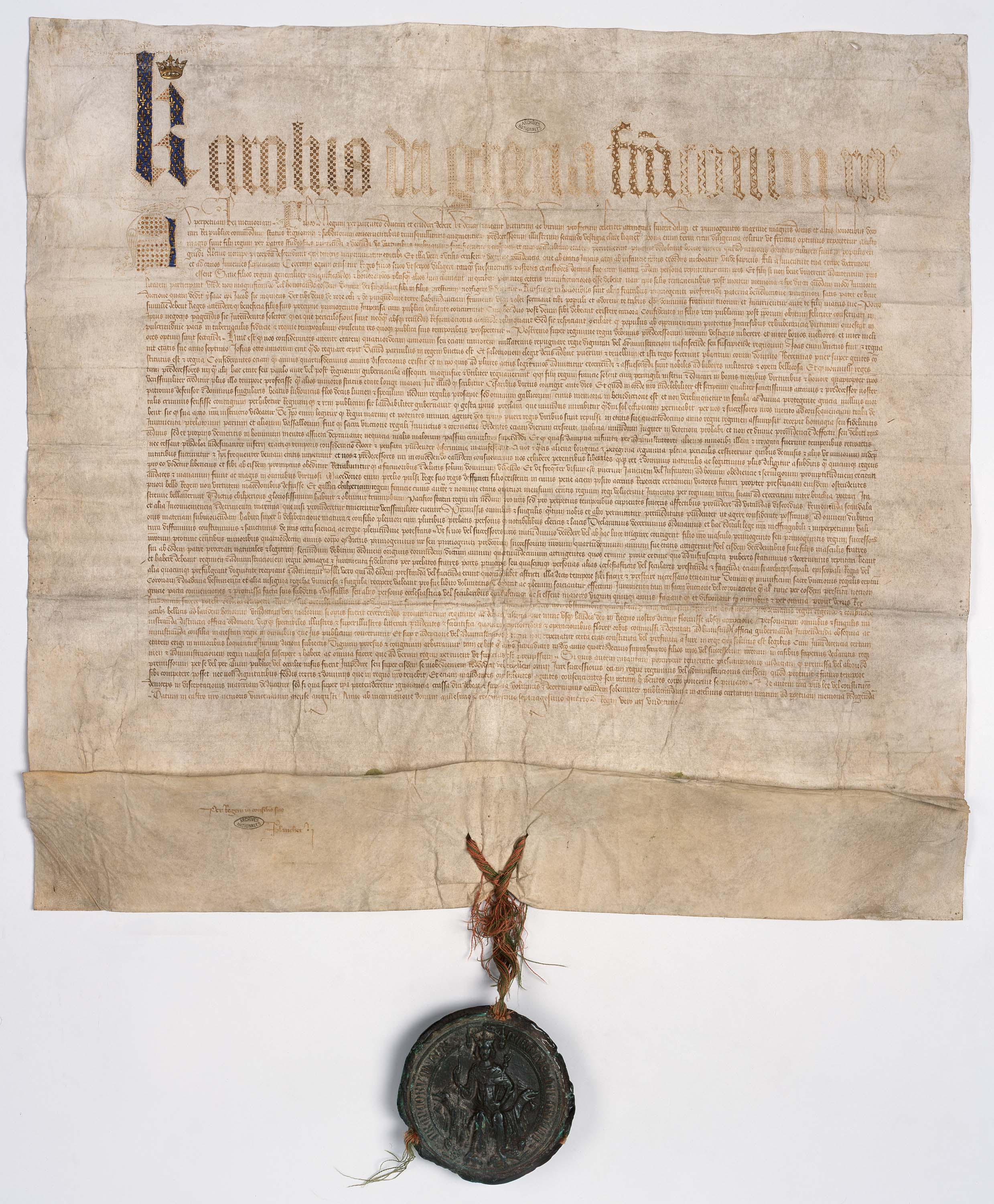 Ordonnance du roi Charles V fixant la majorité des rois de France à 14 ans et l'organisation de la régence. Acte en latin sur parchemin scellé du sceau royal de cire verte pendant sur lacs de soie rouge et verte, daté d'août 1374.